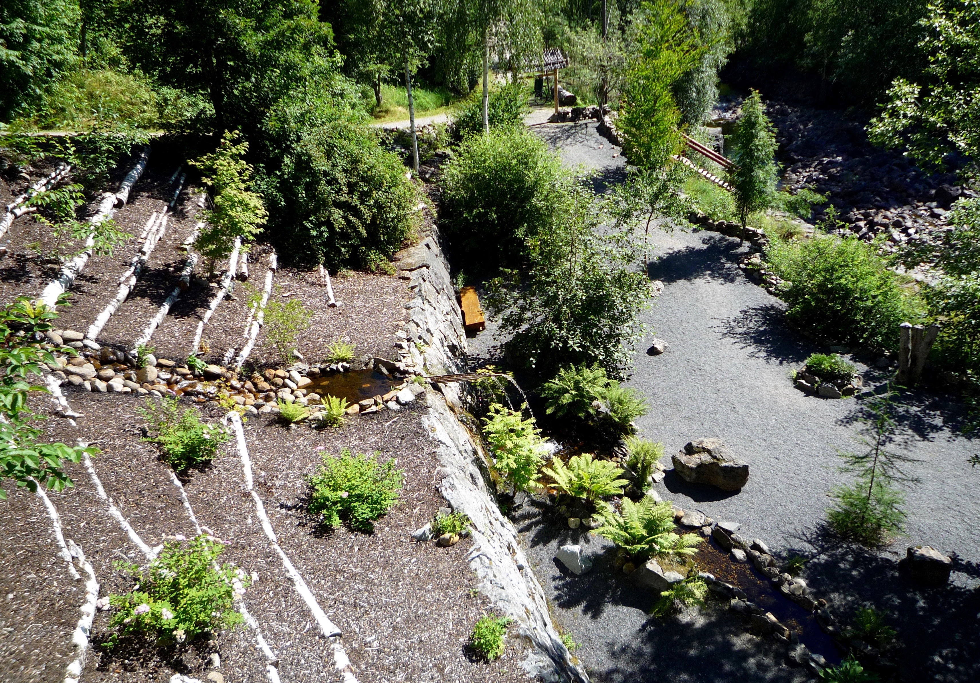 Japanska trädgården ligger centralt i Arboretum Norr.